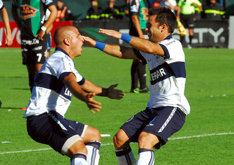 Franco Mussis y Franco Niell, celebrando un gol de Gimnasia y Esgrima La Plata durante el torneo 2012/13 de la Primera B Nacional, temporada en la que el equipo platense retornó a Primera División.